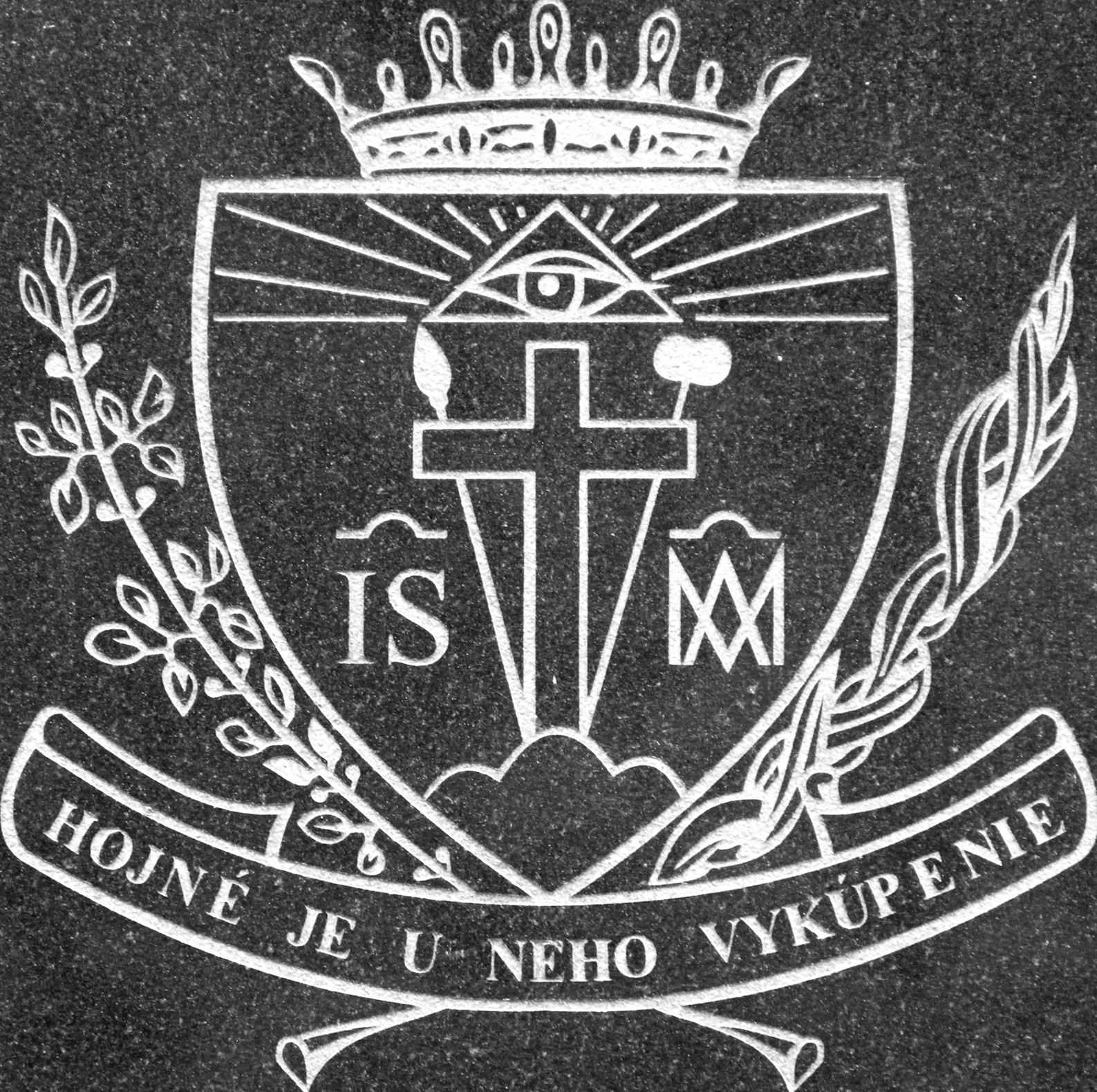 Coat of arms of Congregatio Sanctissimi Redemptoris. Common grave of redemptorists, cemetery in Staré Hory, Slovakia.